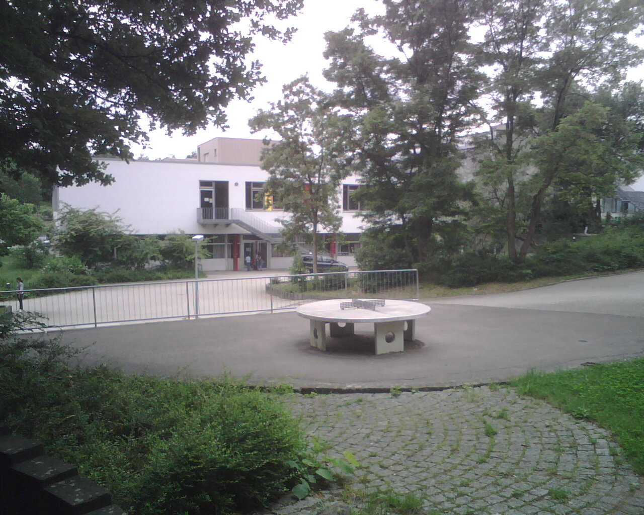 Geschwister Scholl Schule - Tübingen